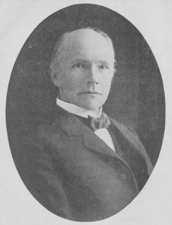 Karl Lous